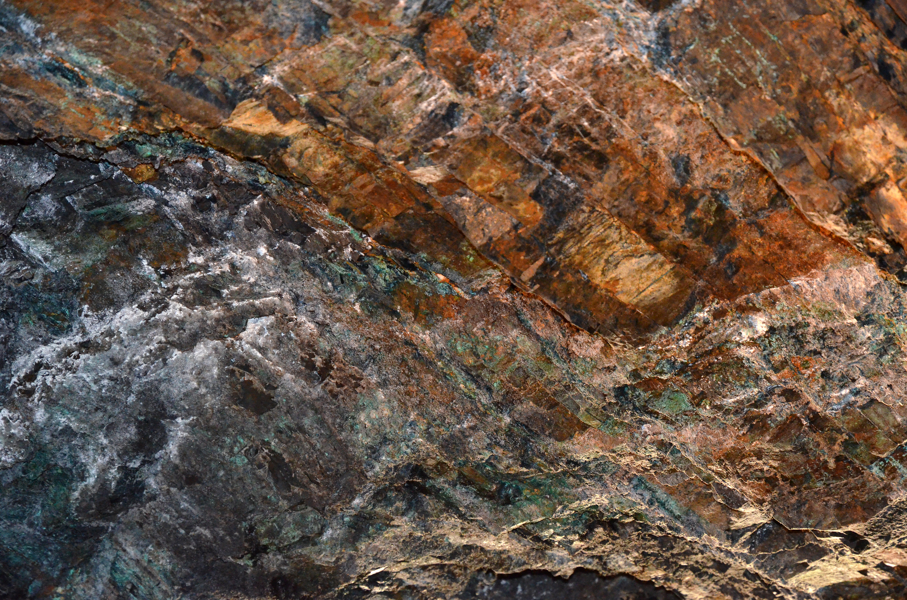 Kilianstollen, Marsberg